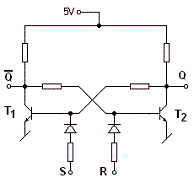 Schemat przerzutnika tranzystorowego RS.